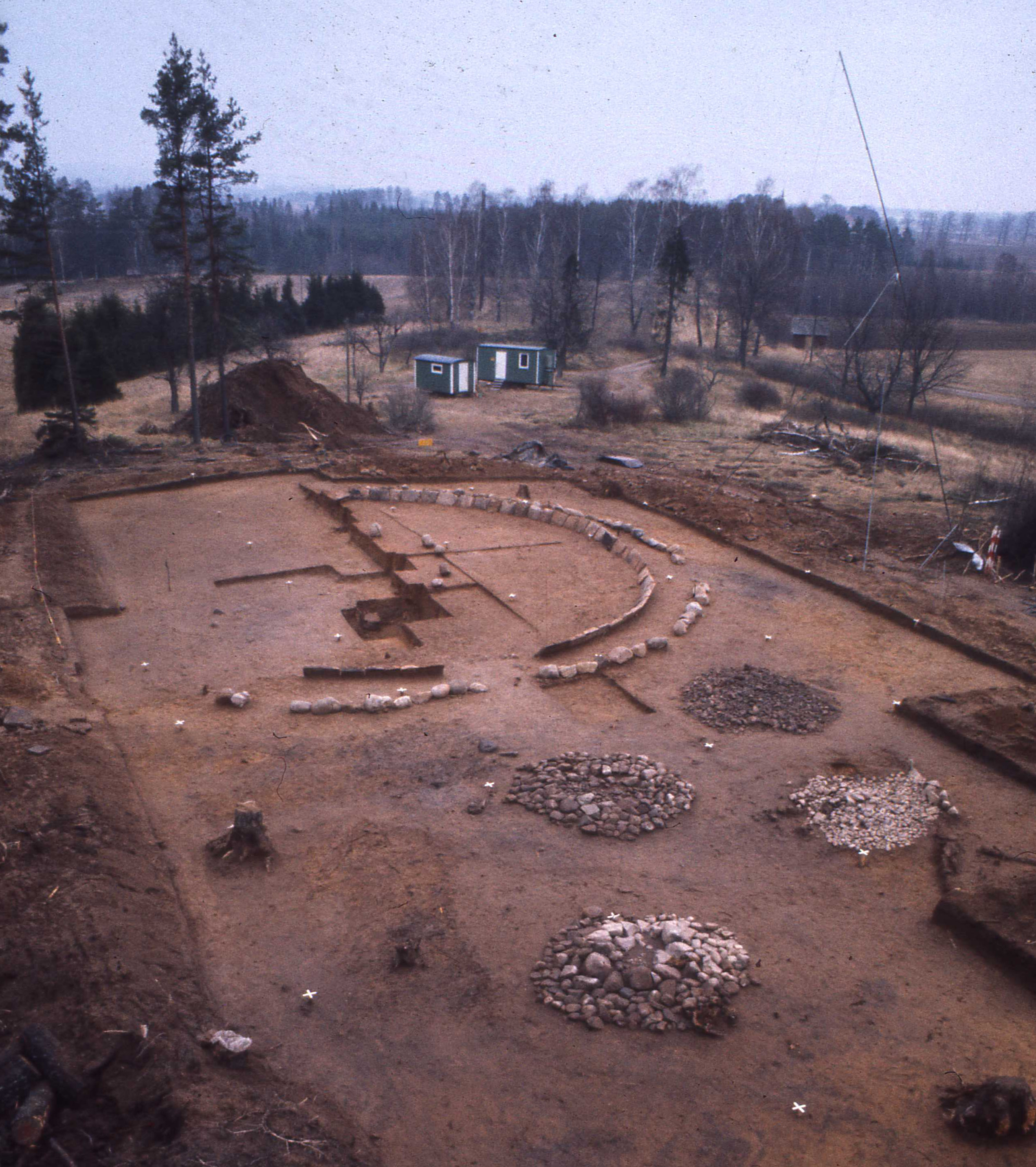 Sagaholmshögen under utgrävning plan